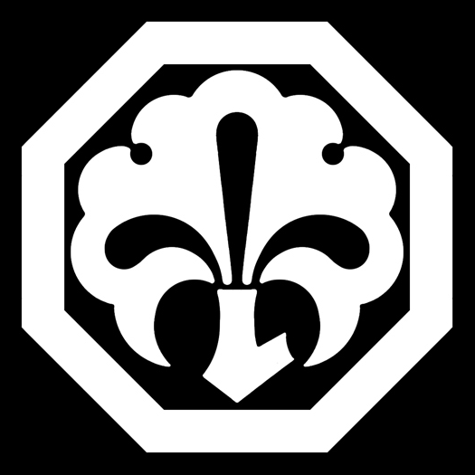 「角切銀杏」紋（染抜）